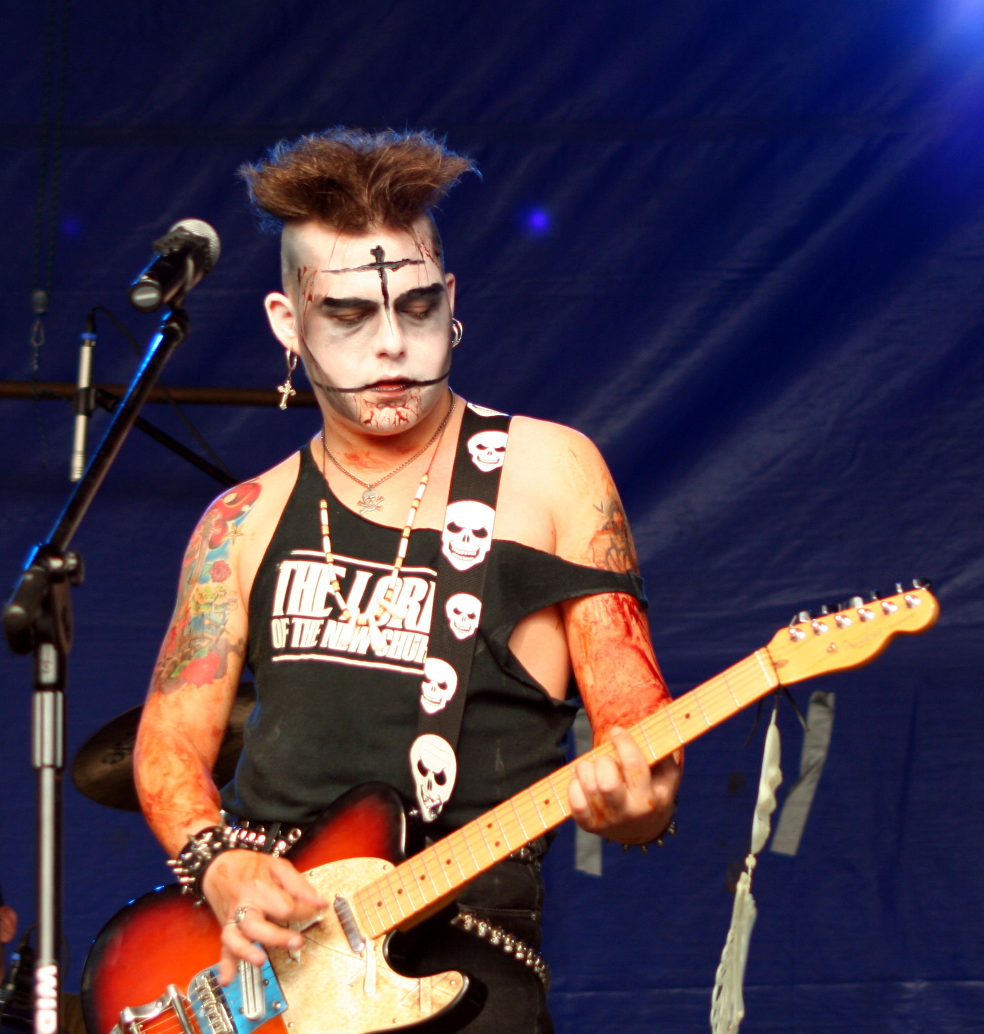 Nerve 69 z zespołu Miguel and the Living Dead podczas Castle party w 2007 roku